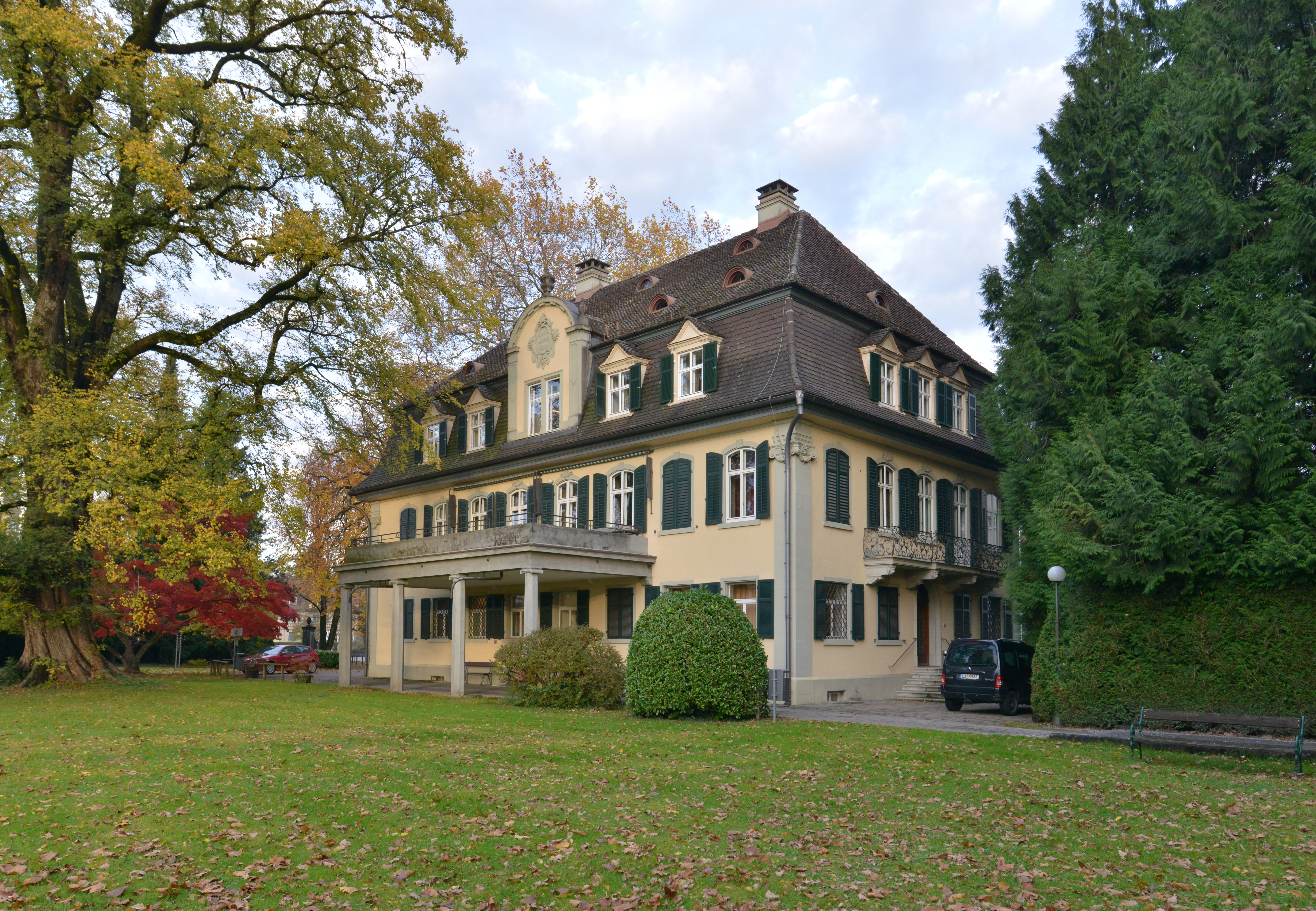 aus dem DEHIO Vorarlberg 1983: (Römerstrasse) Arlbergstrasse Nr.66: Villa Liebenstein, in spitzwinkeligem Zwickel zwischen Arlbergstraße und Riedergasse. Späthistoristisch, von Johann Anton Tscharner, 1915 Umbau durch Ziegler, 1922 durch Palmer. Besonderer Repräsentationskarakter durch neobarocke Formen, Mansardwalmdach, Straßenseitig 8 Fensterachsen, Dacherker mit Rundbogenschluß, Gaupen. Eingang schmalseitig mit als Balkon dienender Verdachung, originale Parkanlage mit Einfriedung. *** Quelle 2: Vermutlicher Erbauer: Freiherr Gustav Adolf von Liebenstein, k.k. Leutnant und Gutsbesitzer in Rieden. Ab 1880 Handelsschule des Direktors Alwin Hauser, 1910 im Besitz der Familie Schoeller. Nach dem Zweiten Weltkrieg: Dienststelle der französischen Besatzungsmacht. 1953 trat Rudolf Schoeller die Villa an die Wollgarnspinnerei Schoeller Ges.m.b.H. ab. Seit 1982 im Besitz der Stadt Bregenz. *** in Bregenz, Vorarlberg.